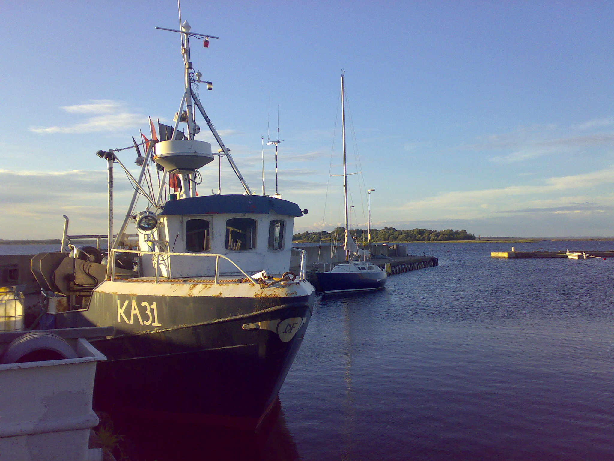 Fisherboat from Karlskrona at Hasslö, Sweden.